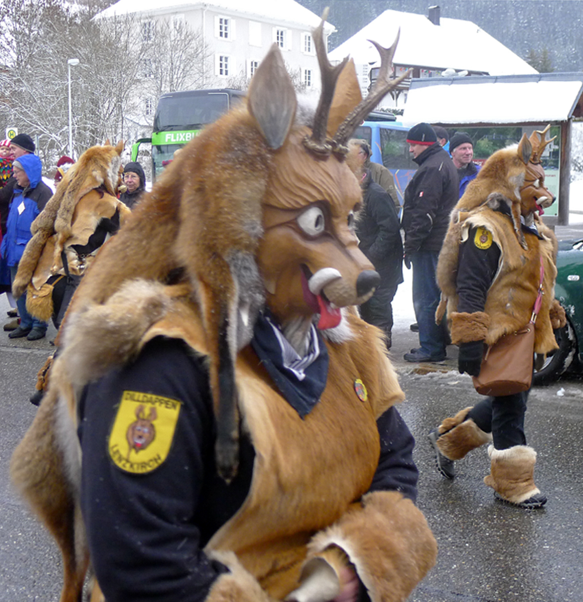 Lenzkircher Dilldappen beim Jubiläumsumzug 150 Jahre Lenzkircher Fasnet am 3. Februar 2019